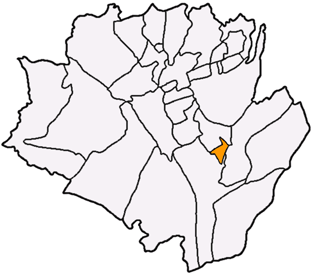 建林里在龍潭區 (台灣)中的位置